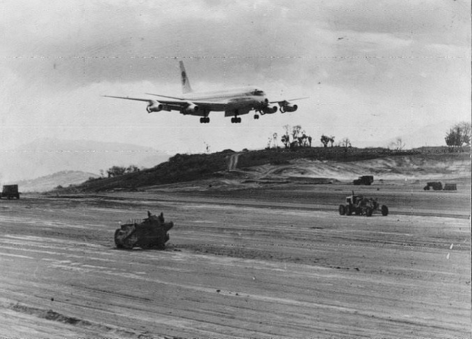 Boeing 707 de Pan American World Airways aterrizando en Ciudad de Guatemala en 1960.